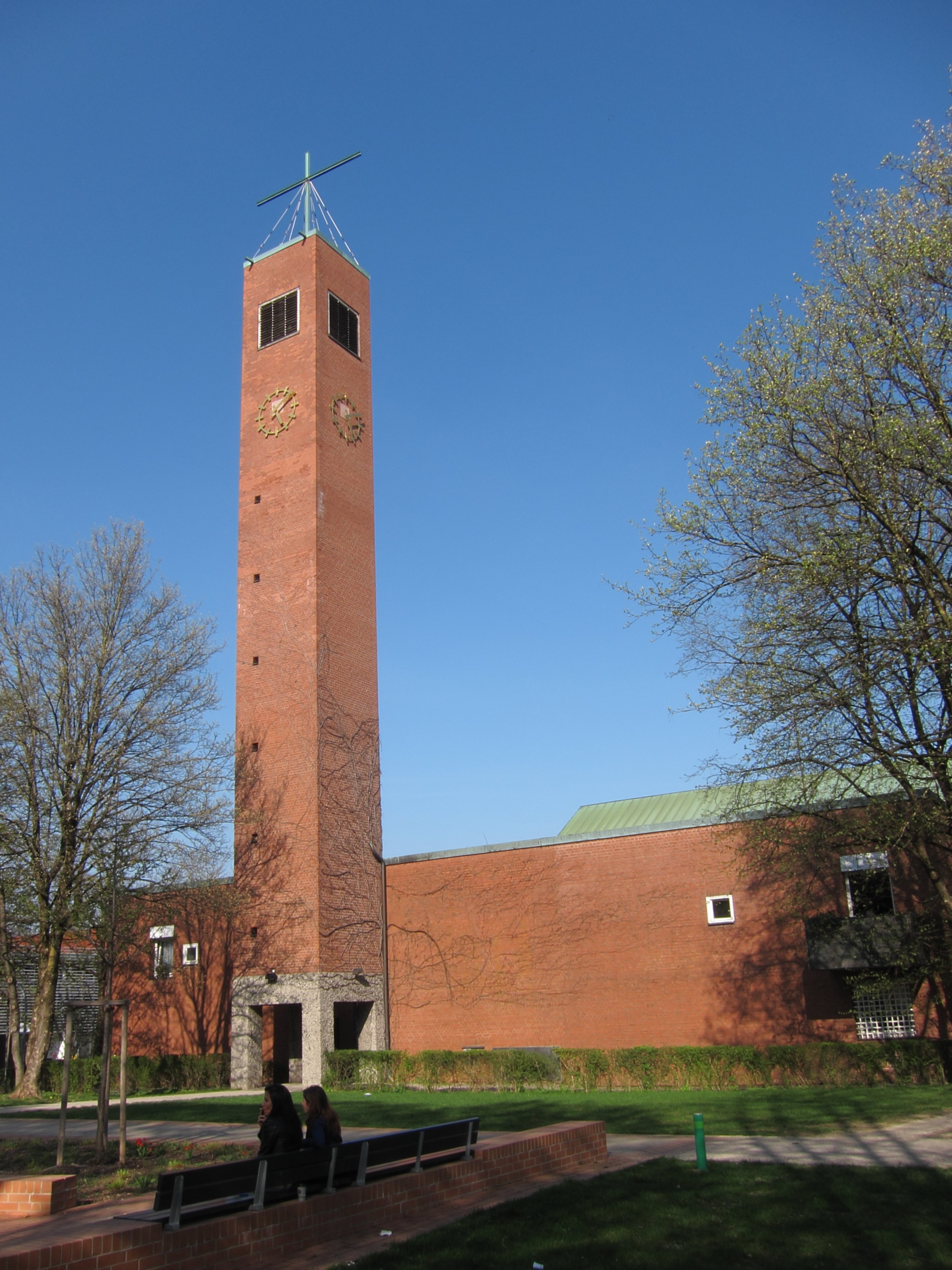 Evang. Luth. Rogatekirche, Bad-Schachener-Straße 28; Pfarrkirche, städtebaulich markante, einheitlich in Sichtziegelmauerwerk gestaltete Baugruppe mit Flach- und Satteldach, bestehend aus Kirche, Gemeindehaus und Pfarrwohnung, die zusammen mit dem hohen Turm als Geviert um einen gegen die Straße abgeschlossenen Hof angeordnet sind, längsgerichteter Kirchenraum mit vier sich nach oben verjüngenden Betonstützen, baldachinähnlicher, die Außenwände nicht berührender Decke und mit umlaufendem Fensterband; sämtlich von Werner Eichberg, 1963/64; mit Ausstattung.